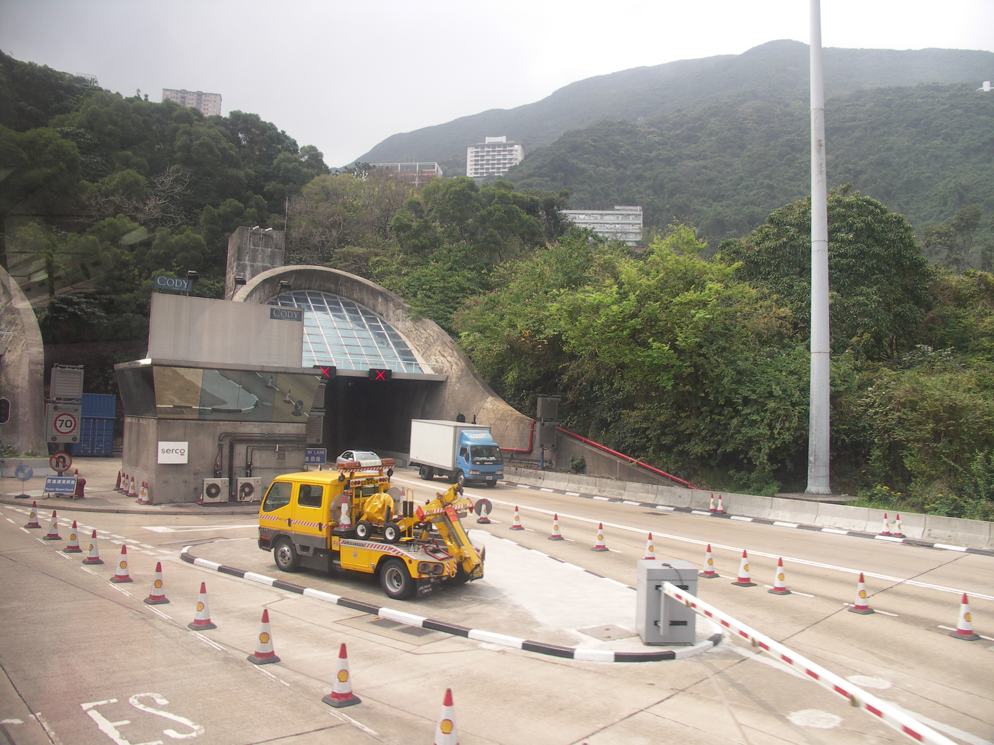 Aberdeen Tunnel, Happy Valley entrance.